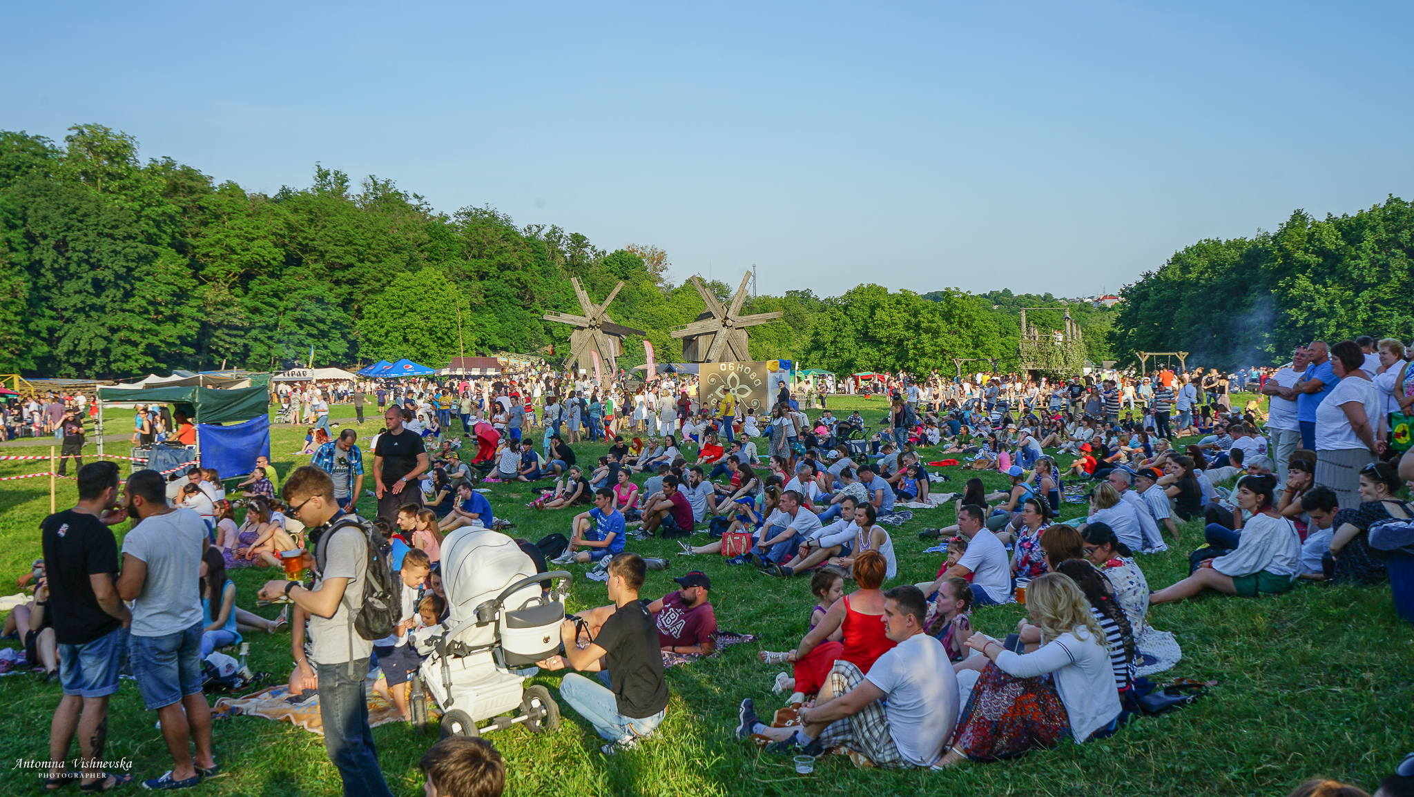 Фестивальне поле. Обнова-фест 2017 (автор А. Вишневська)